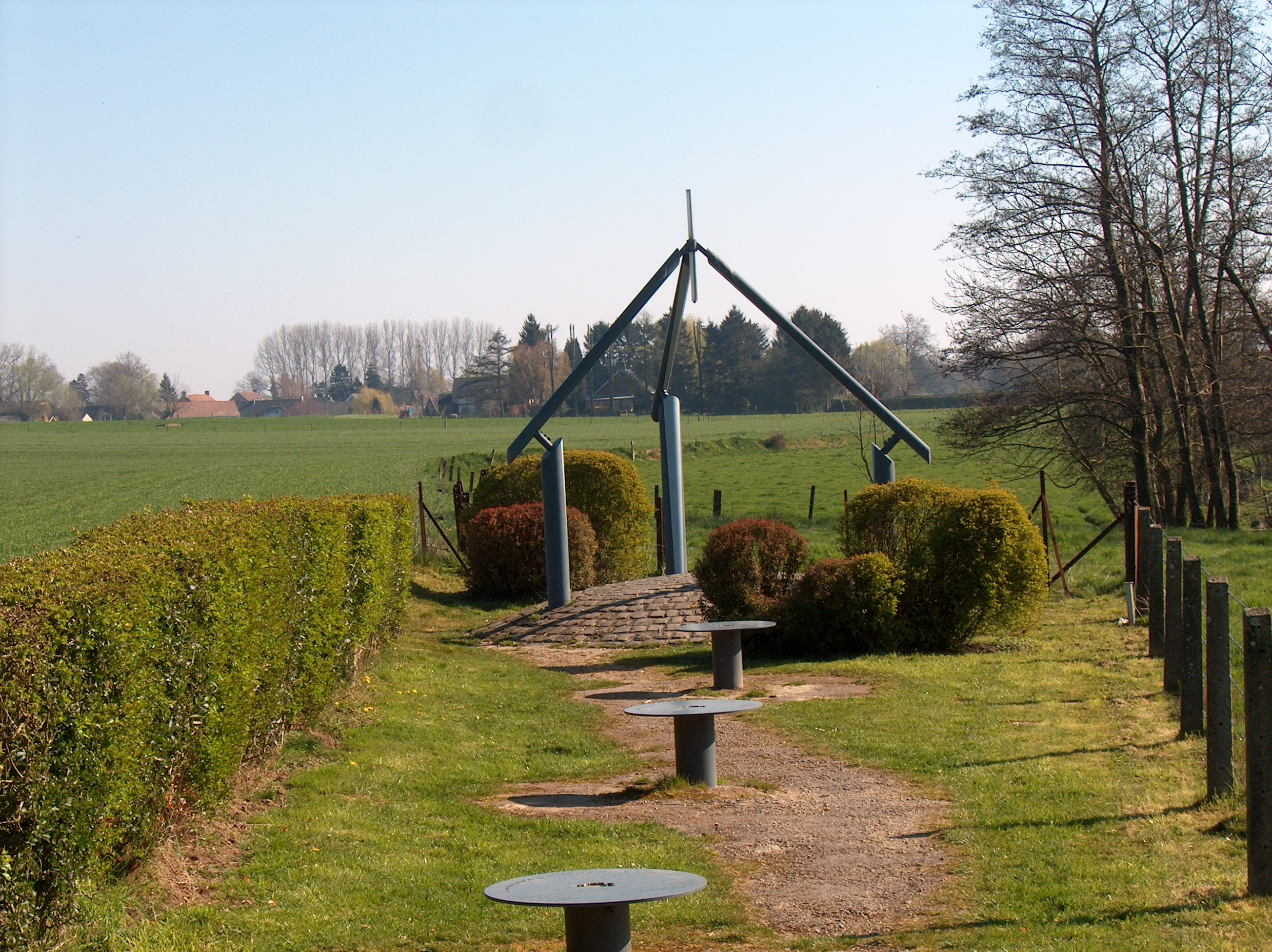 Monument du centre géographique de la Belgique